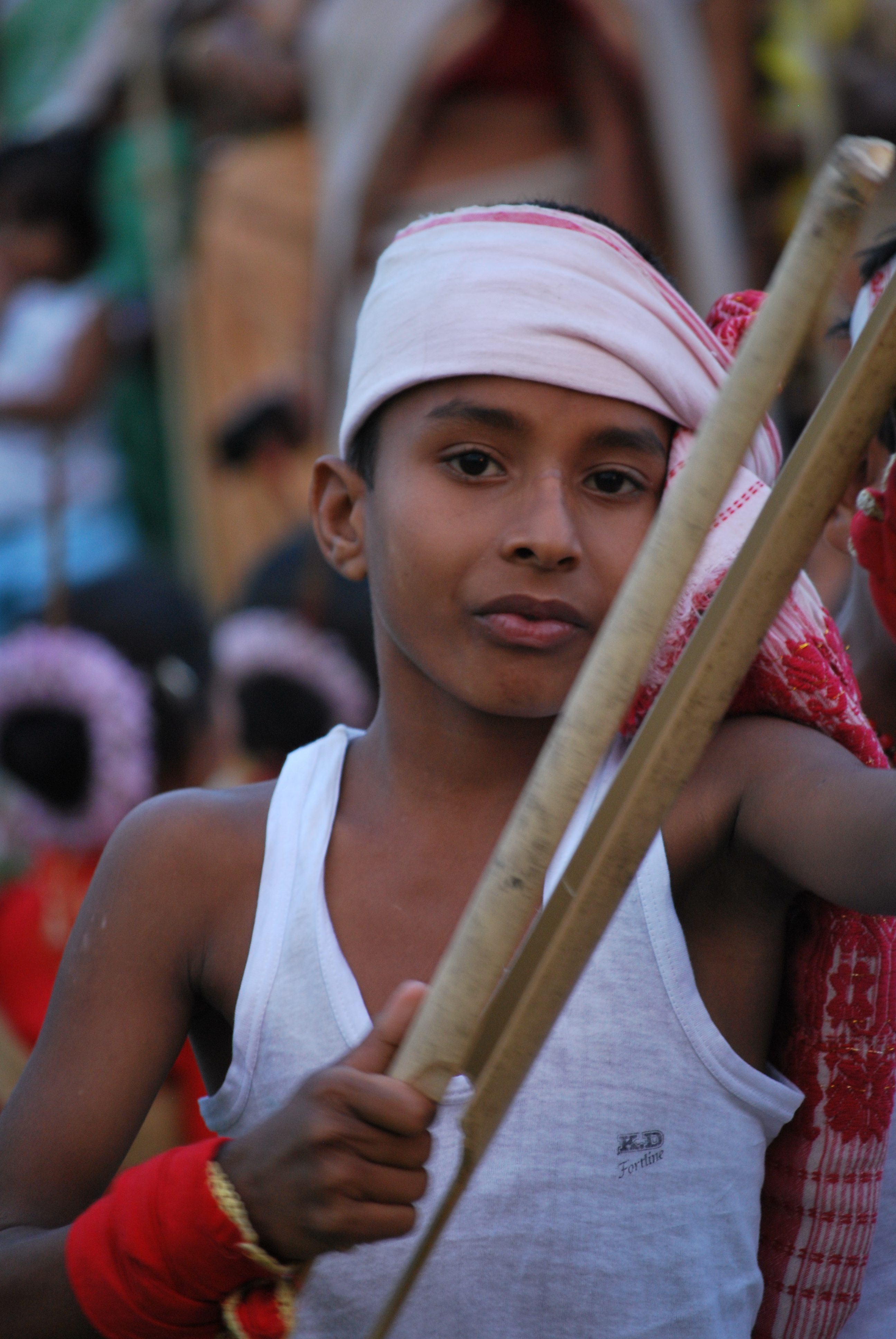 অসমীয়া: টকা বাদ্য বজাই থকা এজন বিহুৱা